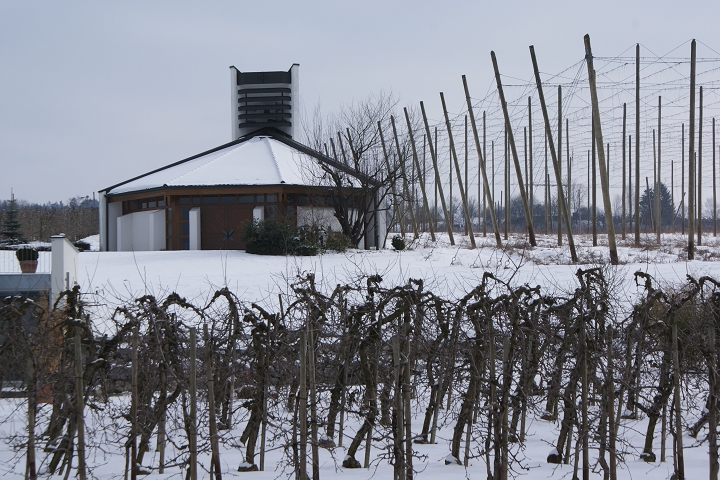 Kapelle Obermeckenbeuren, Gemeinde Meckenbeuren, Bodenseekreis